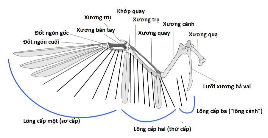 Mô tả giải phẫu và vị trí các lông bay ở trên cánh